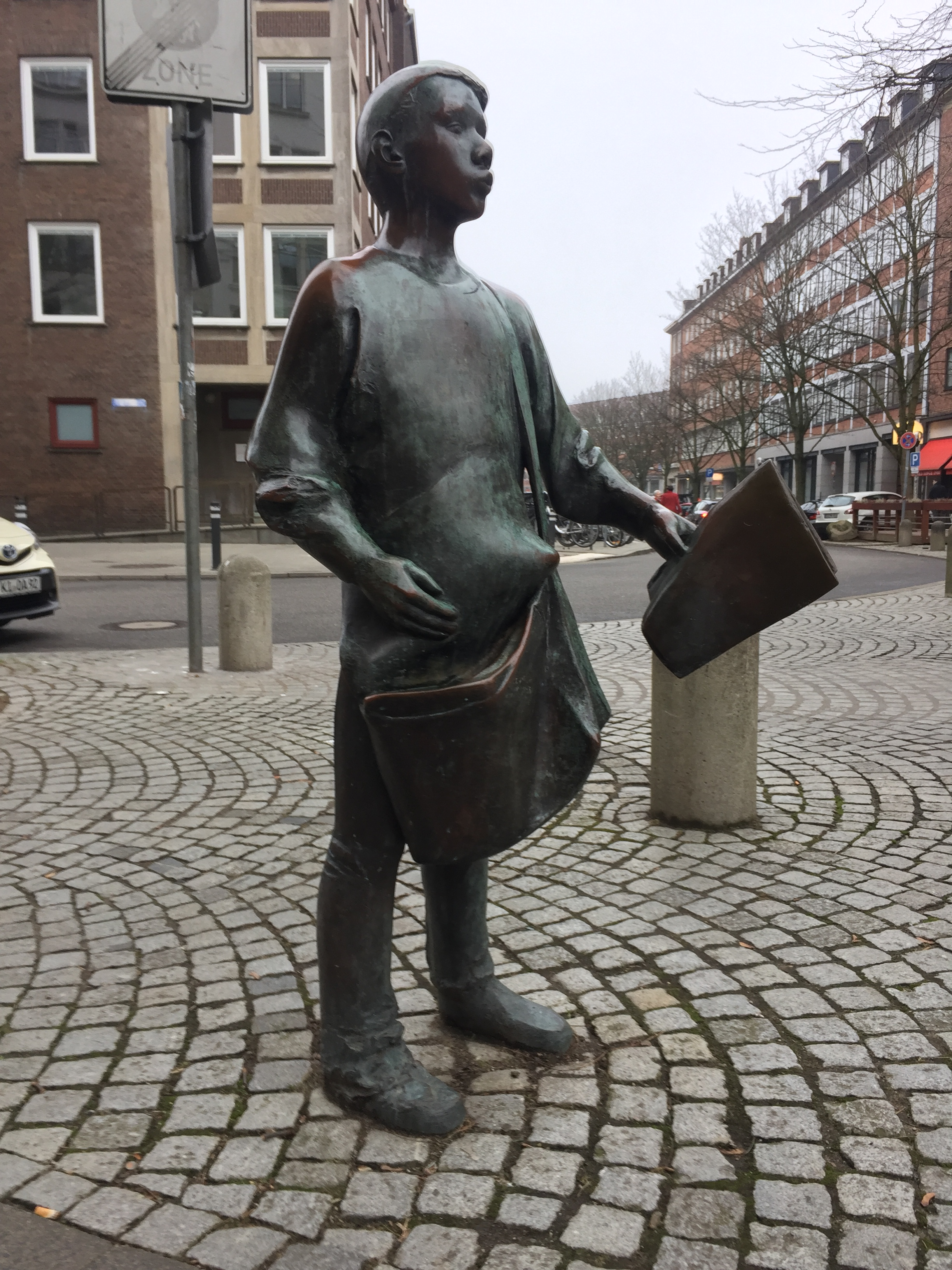 Skulptur "Zeitungsjunge", Kieler Nachrichten